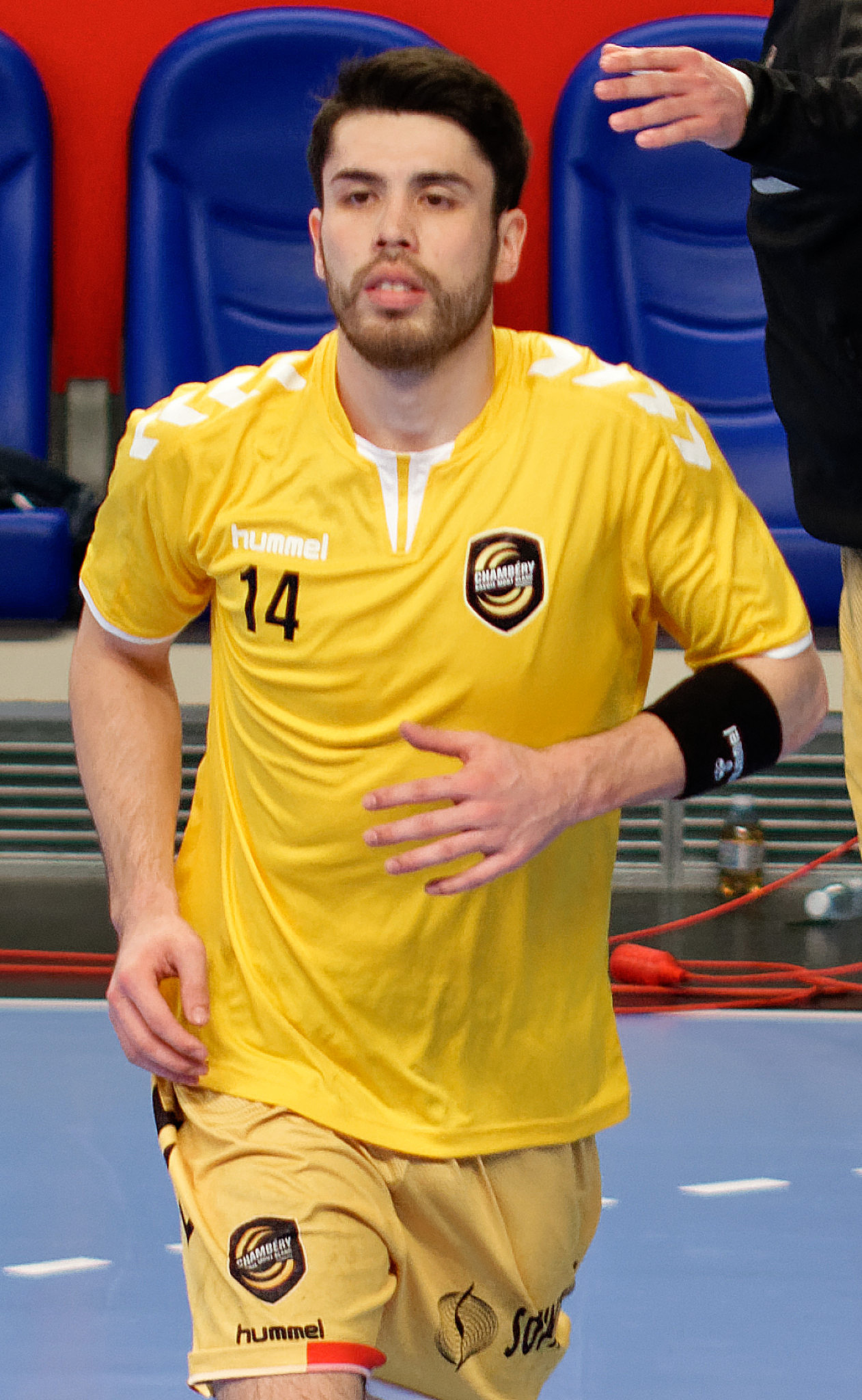 Rencontre de championnat de LidlStarLigue entre le PSG et chambéry. A coubertin, le 15 mars 2017.